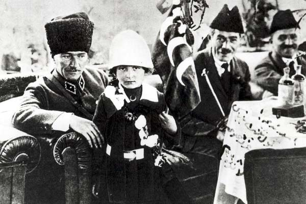 Mustafa Kamal paşa və İbrahim Əbilov Beynəlxalq uşaq bayramında